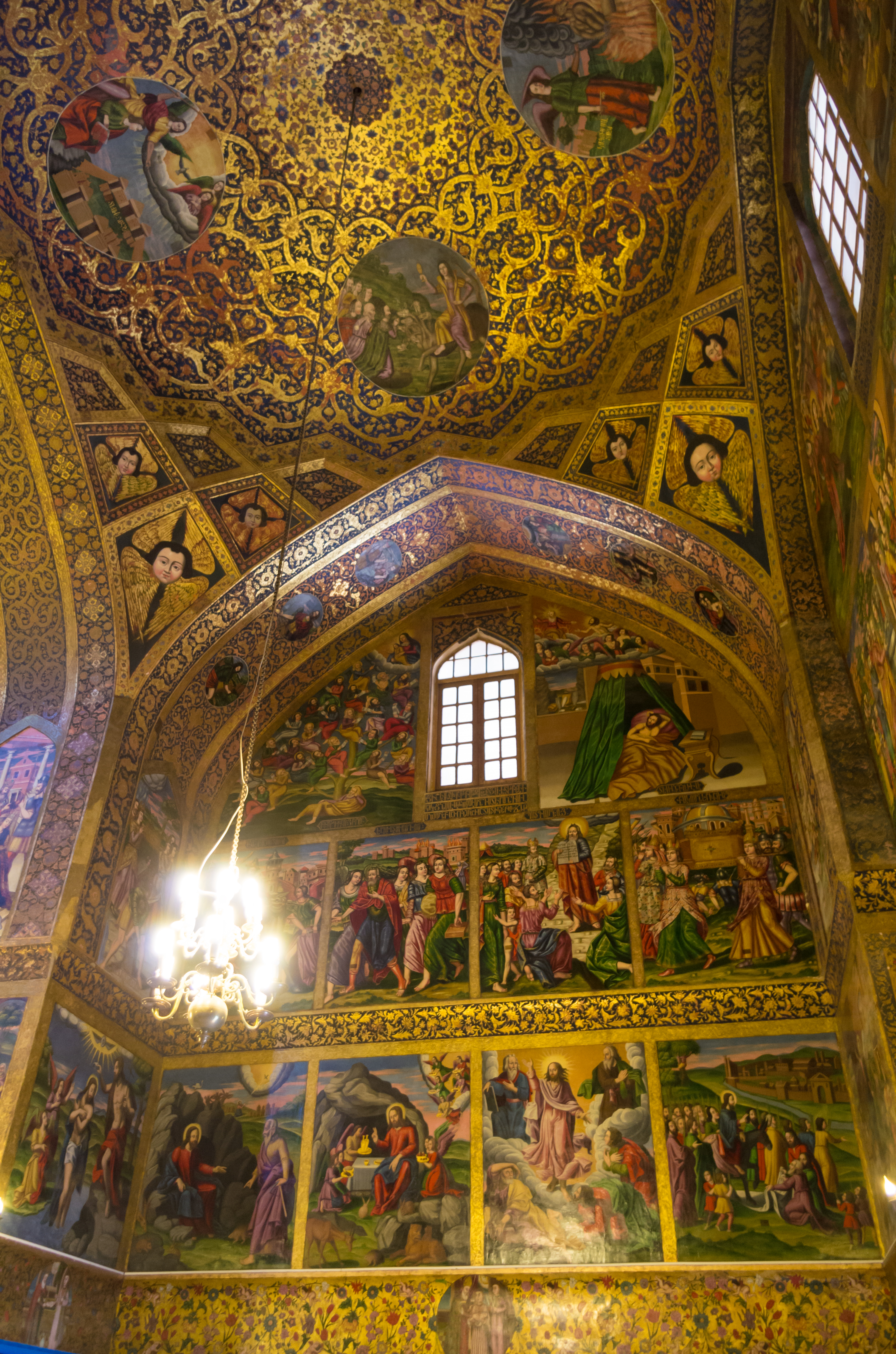 Cathédrale Saint-Sauveur d'Ispahan